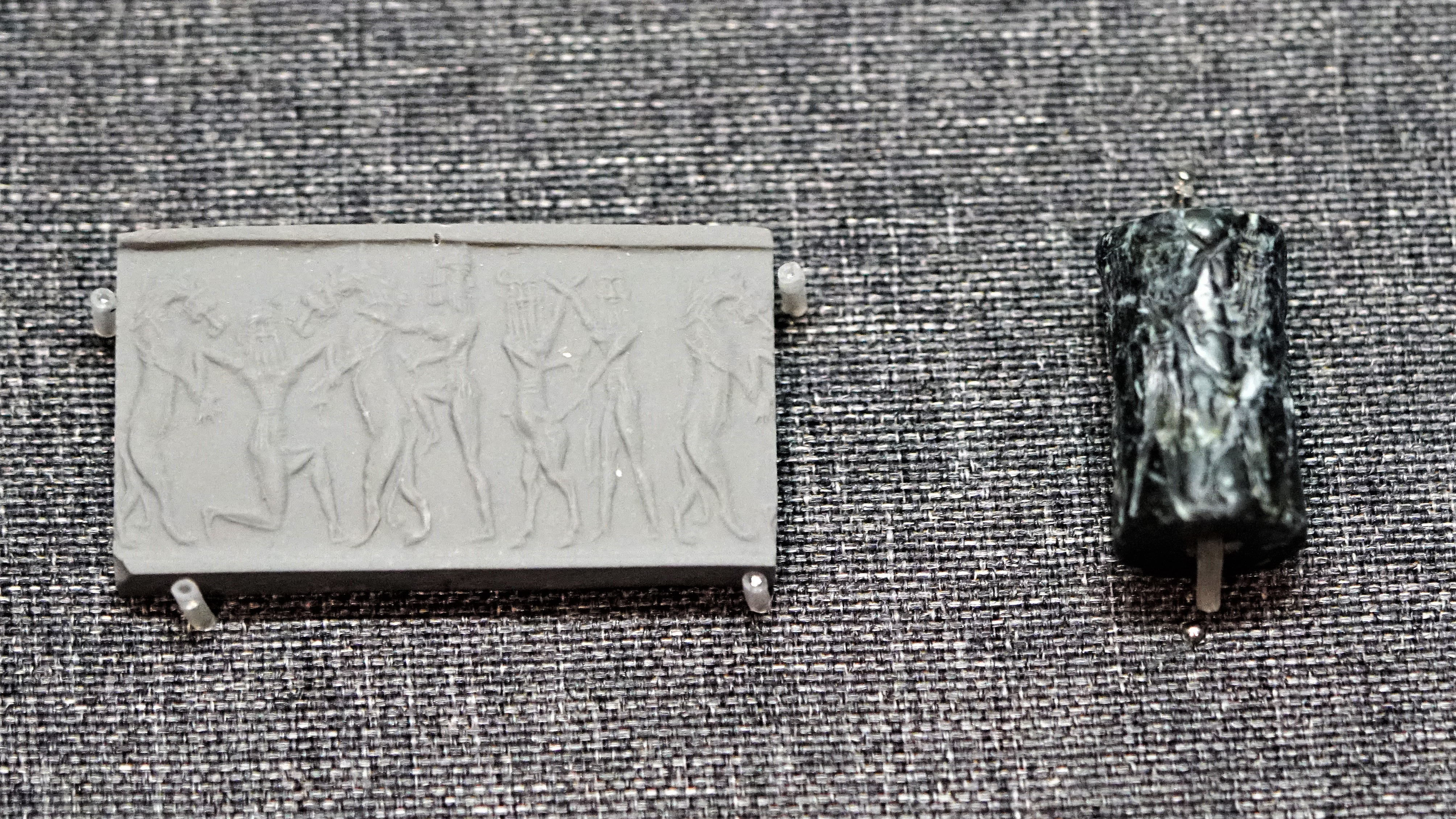 中文（中国大陆）: 石制圆通印章 珍贵石料制成 公元前2200年左右 能在黏土上滚动印出图案 有研究者认为这类印章描绘的画面是《吉尔伽美什》中英雄吉尔伽美什和恩杜克的故事